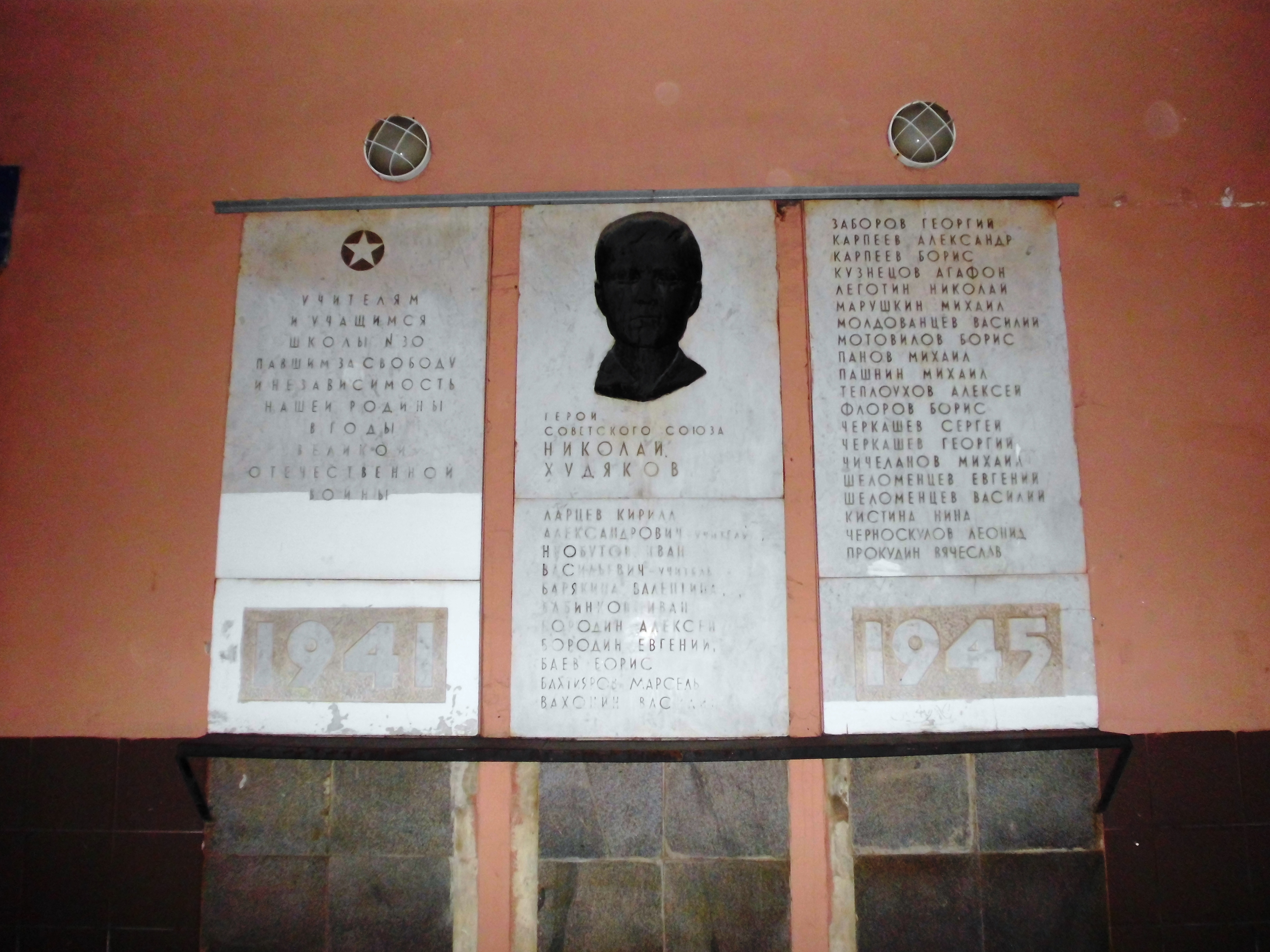 Средняя школа № 30 города Челябинска, ул. Володарского, 20.